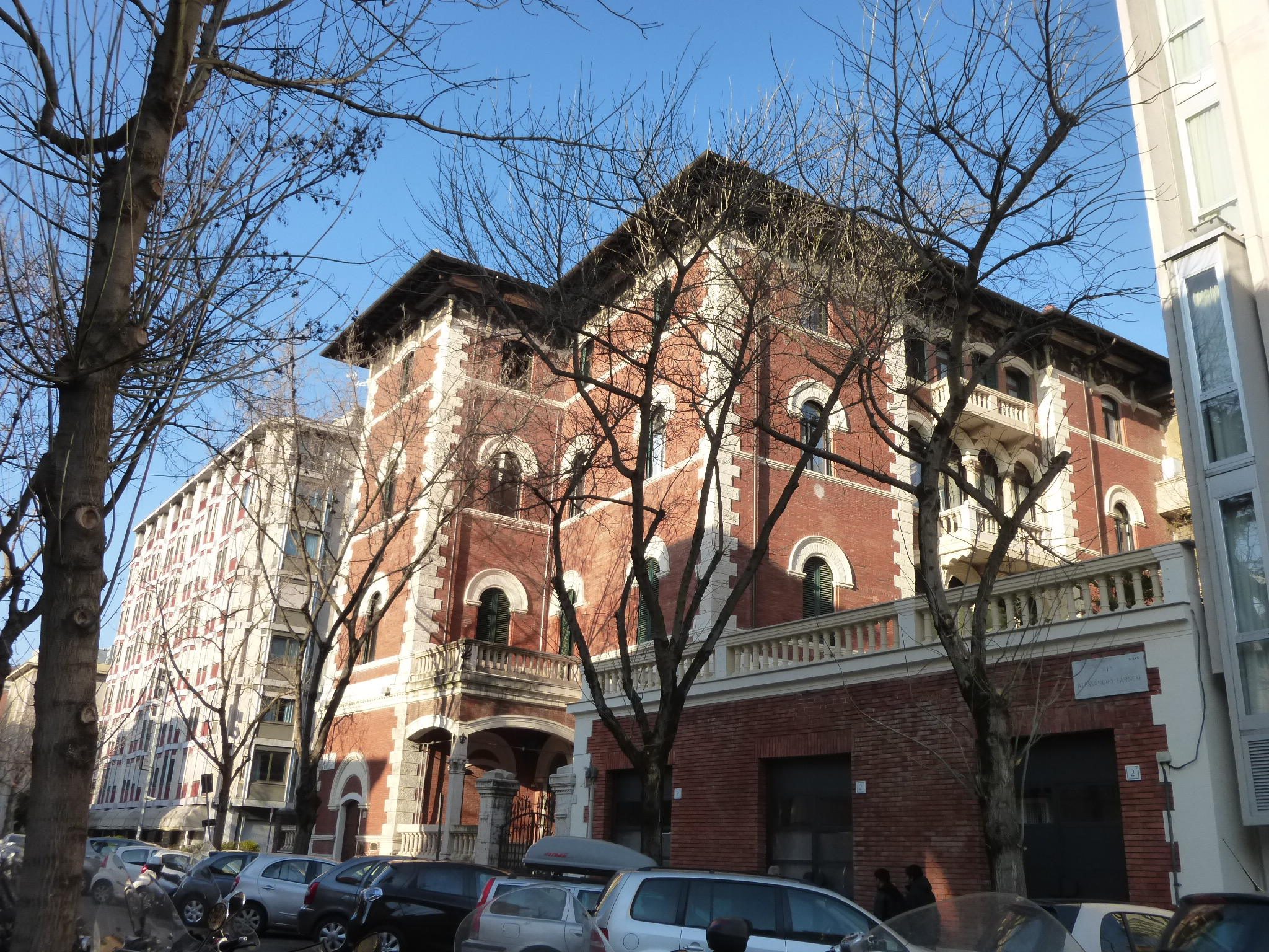 Roma, via Alessandro Farnese, villino Vitali (Arturo Pazzi, 1905)